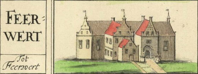 Groote Borg / Aldringaborch te Feerwerd